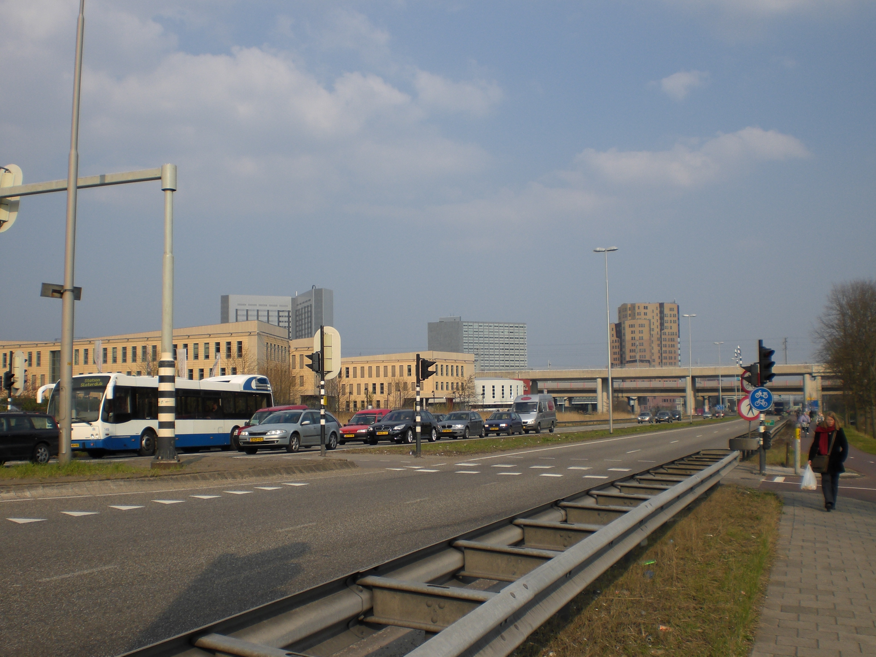 Haarlemmerweg, Amsterdam Licensing Categorie:Amsterdam Categorie:Afbeelding Amsterdam